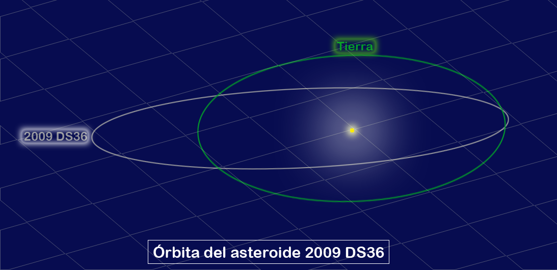 Órbita del asteroide 2009 DS36